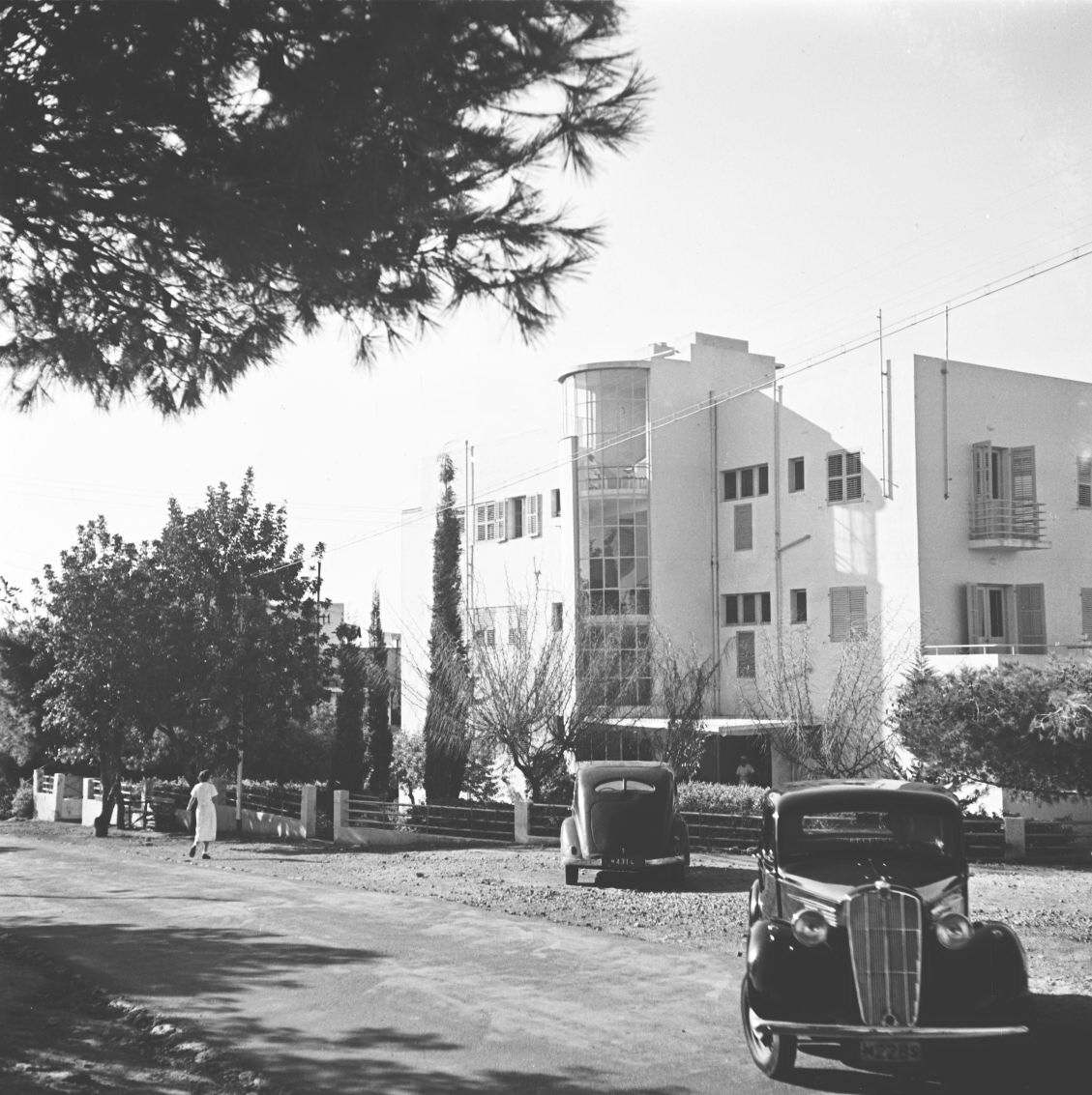 אוסף צילומים של הצלם זולטן קלוגר טווח מספרי התשלילים 31379 - 31461: קופת חולים - בית חולים על הכרמל